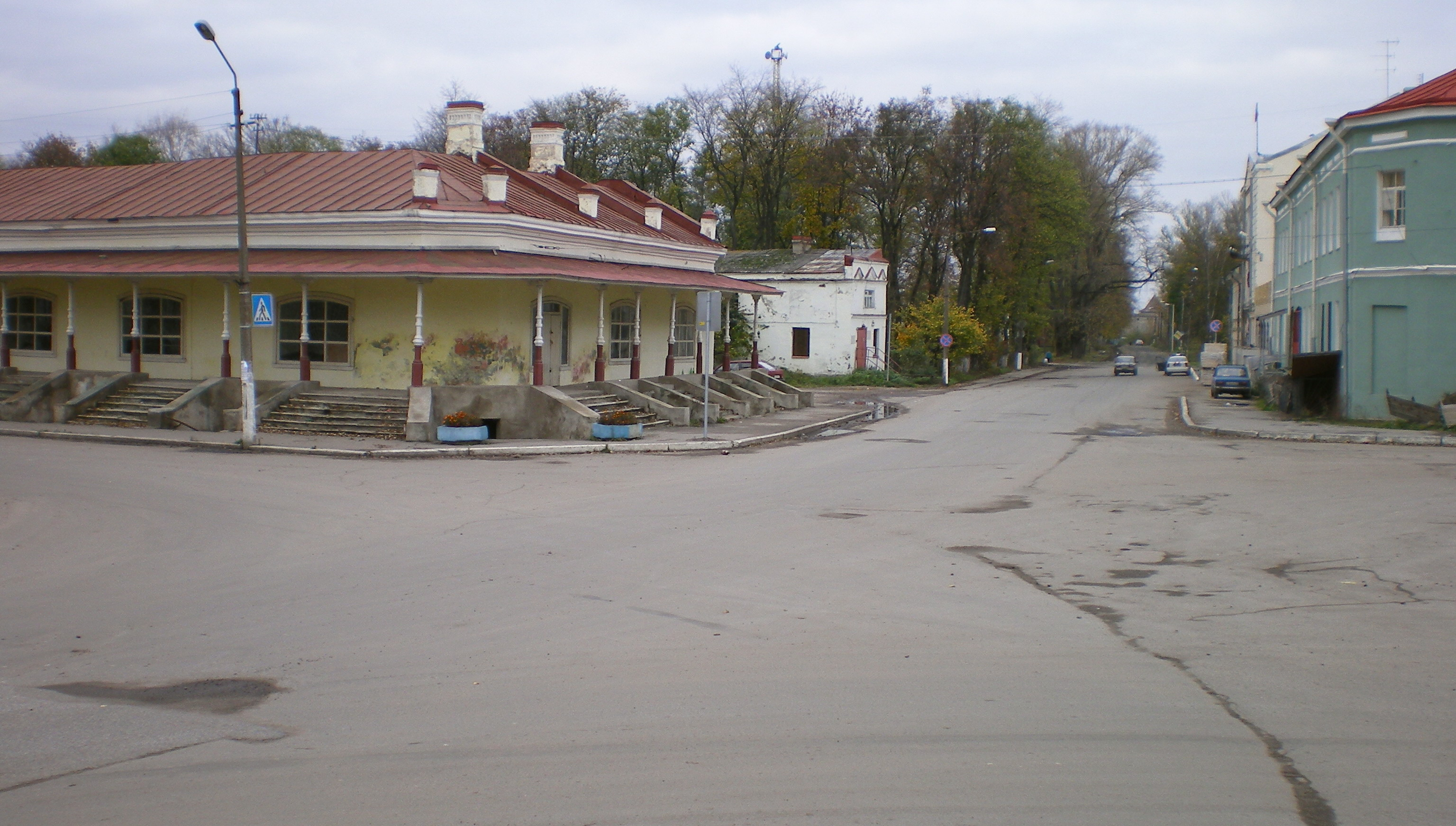 Вид на муниципальное здание с мемориальной табличкой.